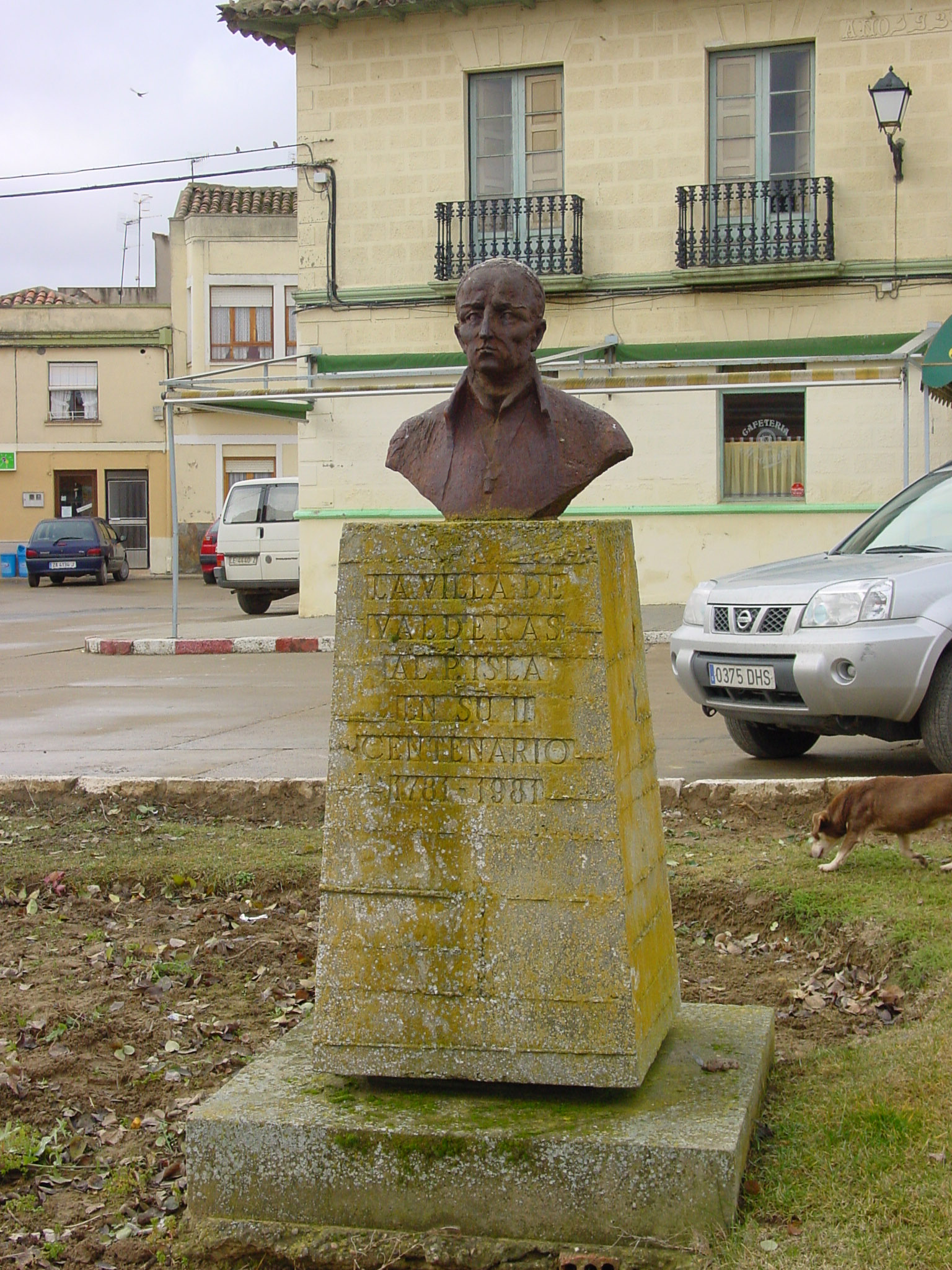 Valderas, estatua del Padre Isla, religioso y escritor español (1706-1781) Estudió en Valderas.